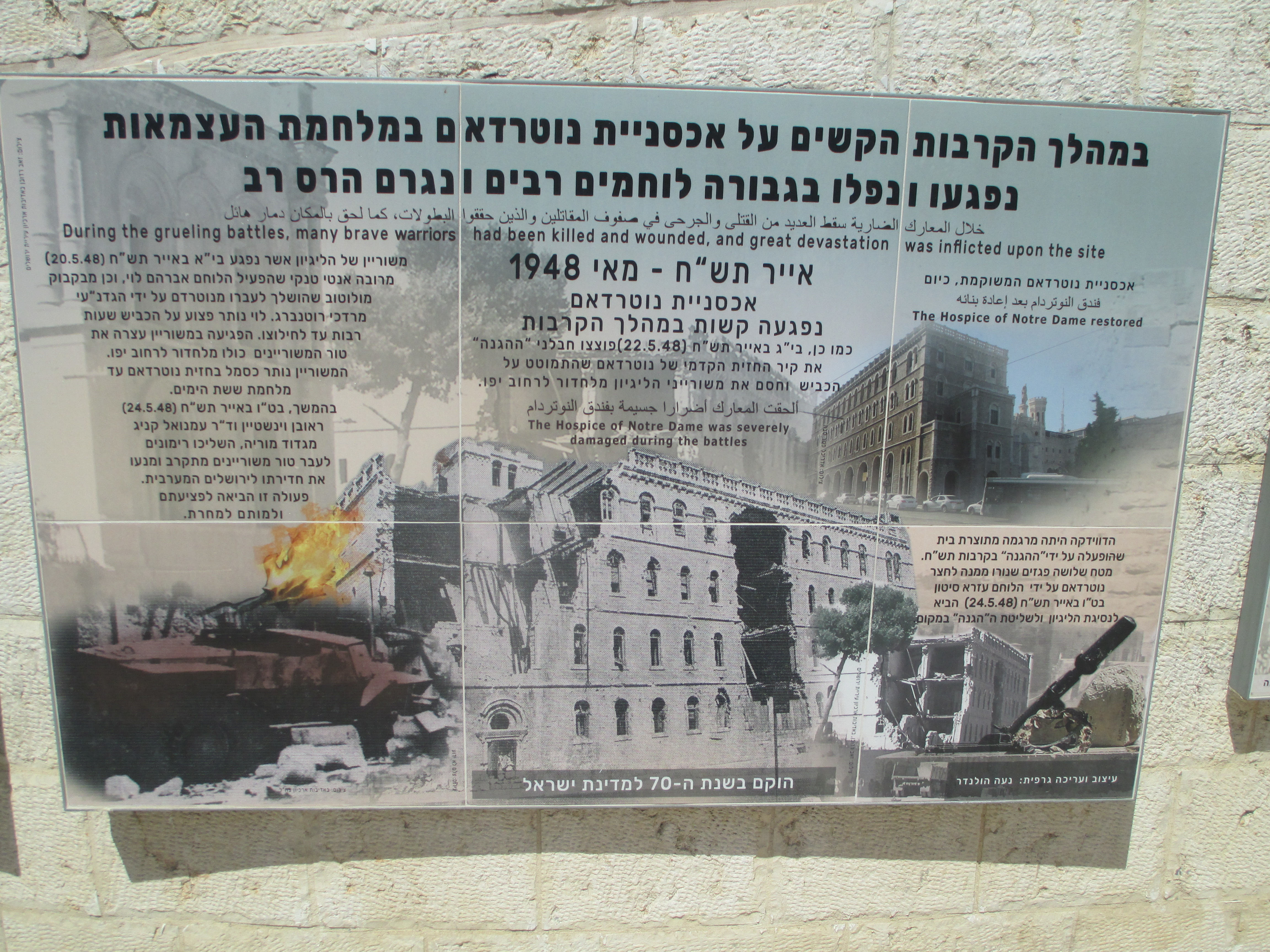 אנדרטת קרב נוטרדאם במלחמת העצמאות בירושלים